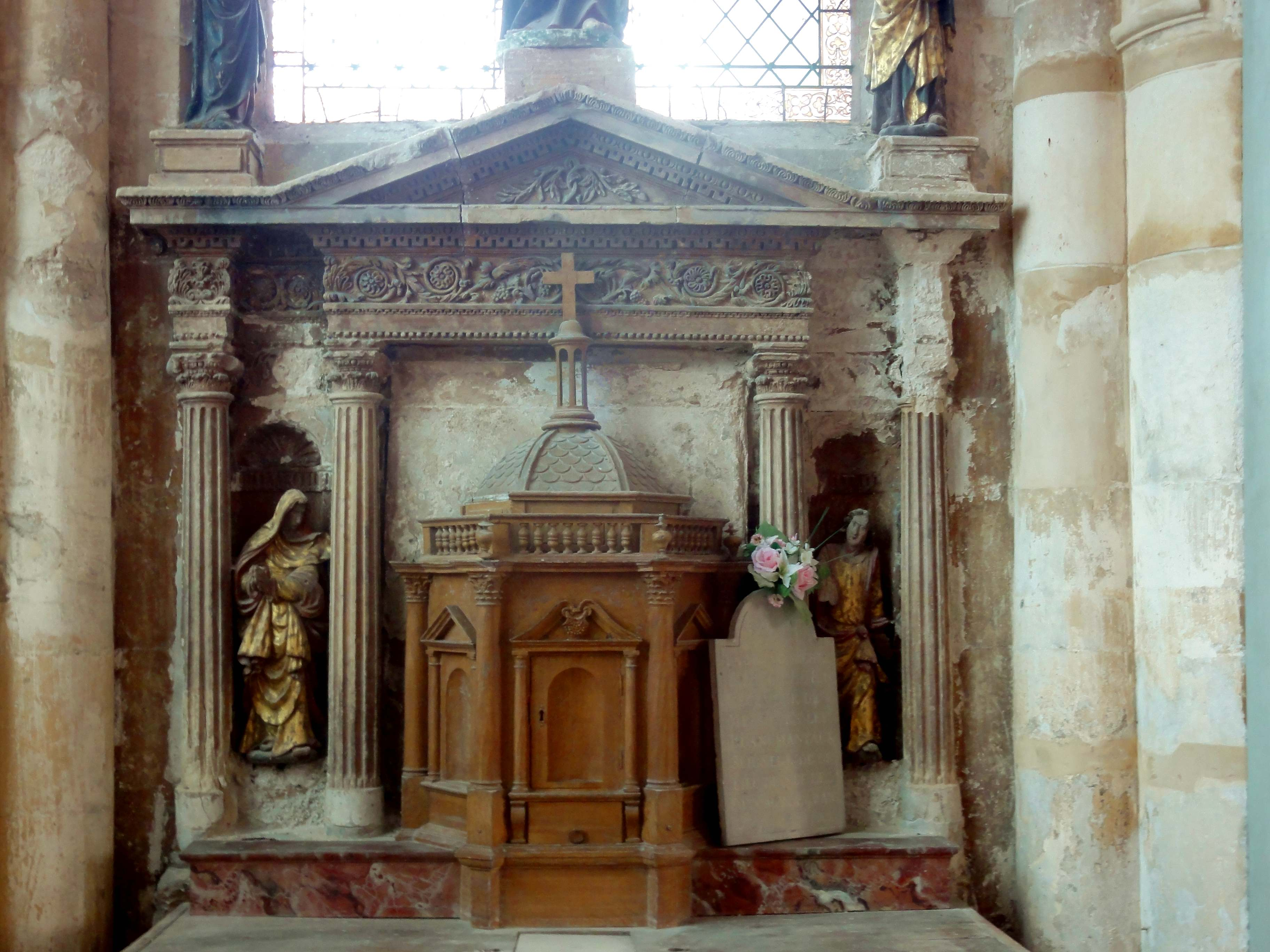 Bas-côté nord, retable.